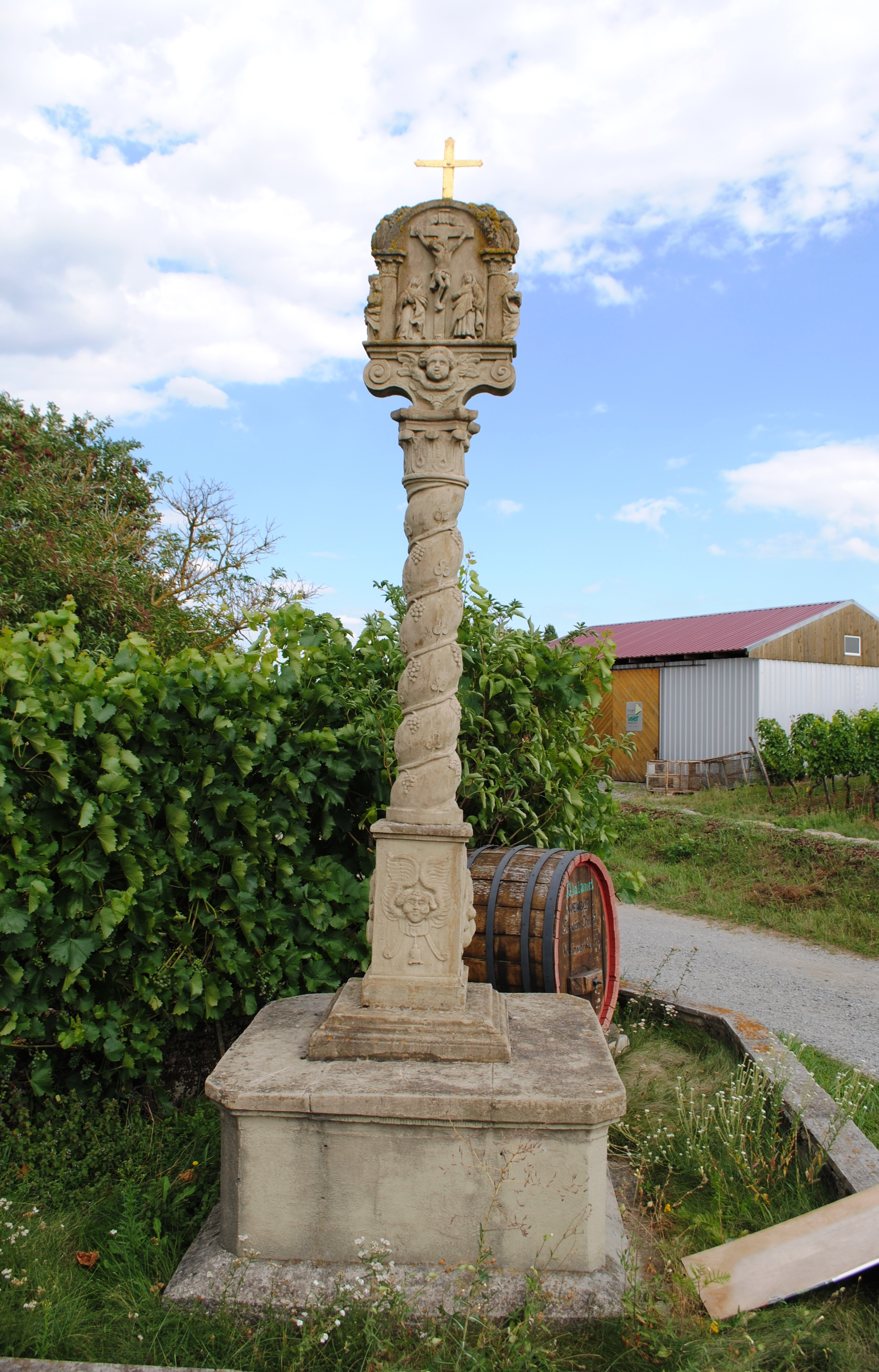 Bildstock, Weinbergsstraße, Nordheim am Main